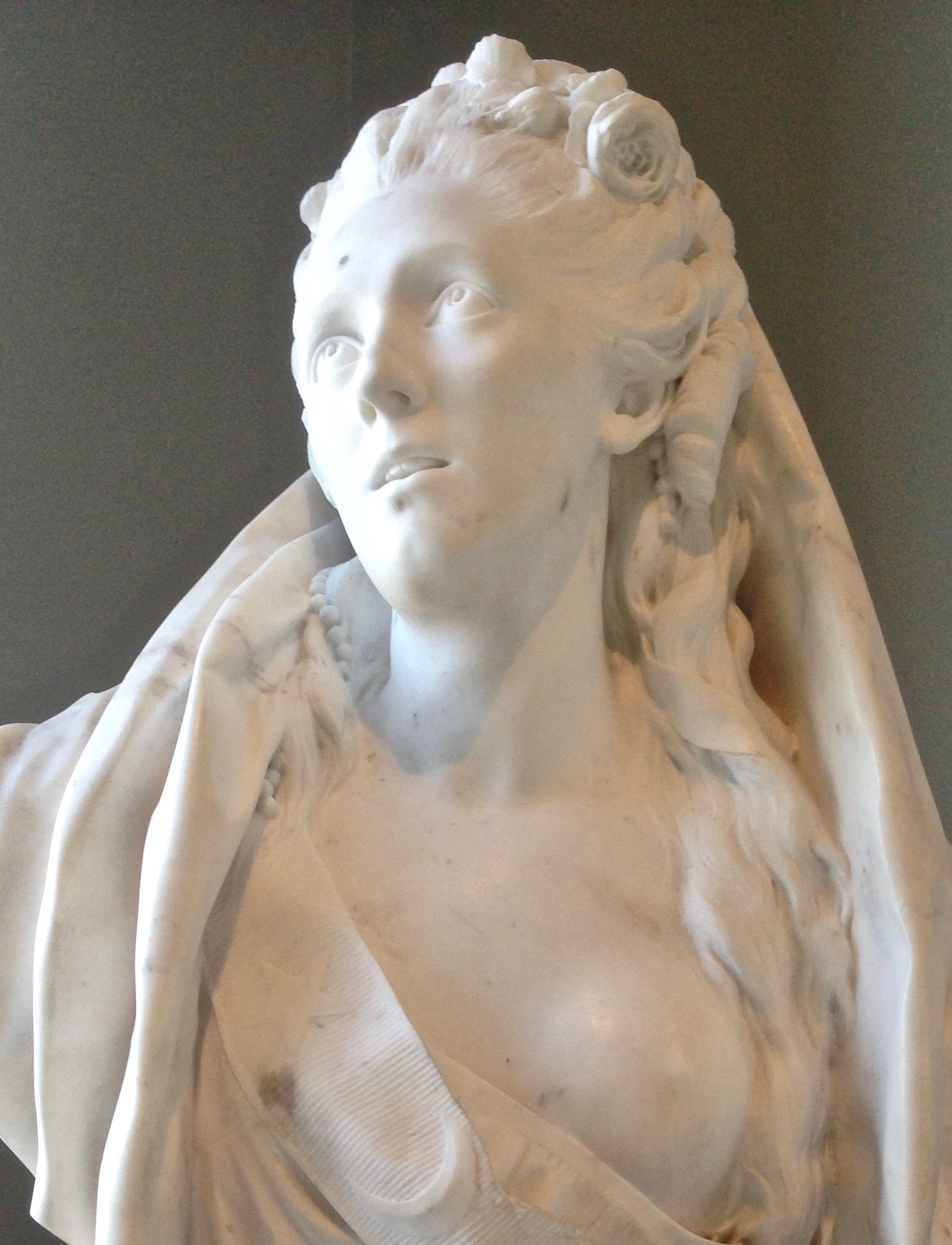 Jean-Antoine Houdon (1741–1828): Die Opernsängerin Sophie Arnould (1744–1802) als Iphigénie von Gluck. Marmor, Louvre, Paris, Detail.